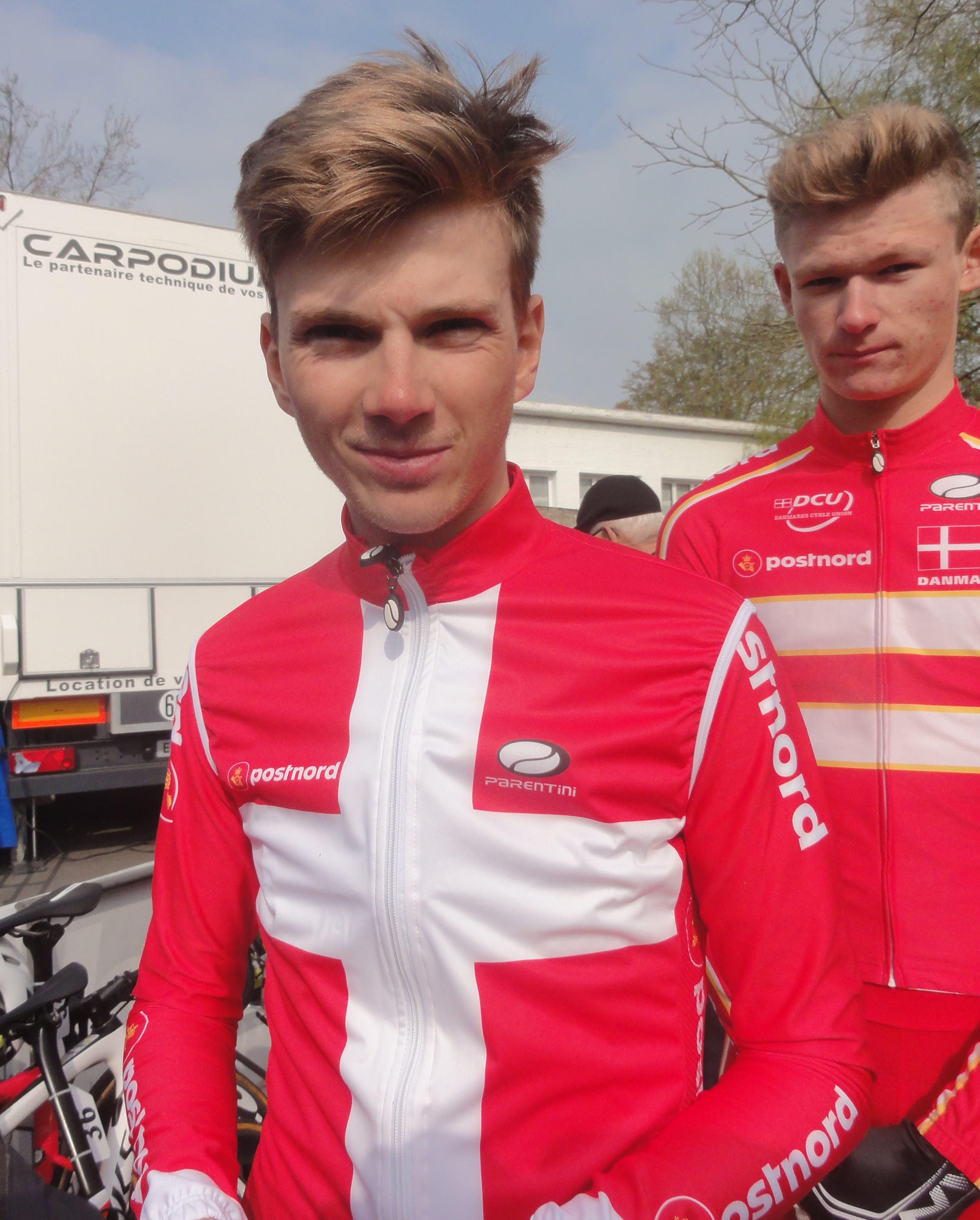 Reportage réalisé le dimanche 14 avril à l'occasion du départ du Paris-Roubaix juniors 2019 à Saint-Amand-les-Eaux, France.